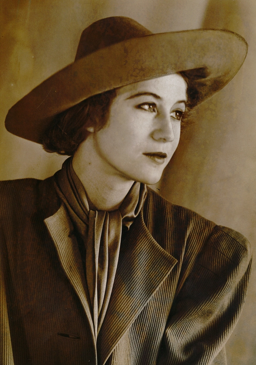 portrett, kvinne, skuespillerinne, brystbilde, hatt